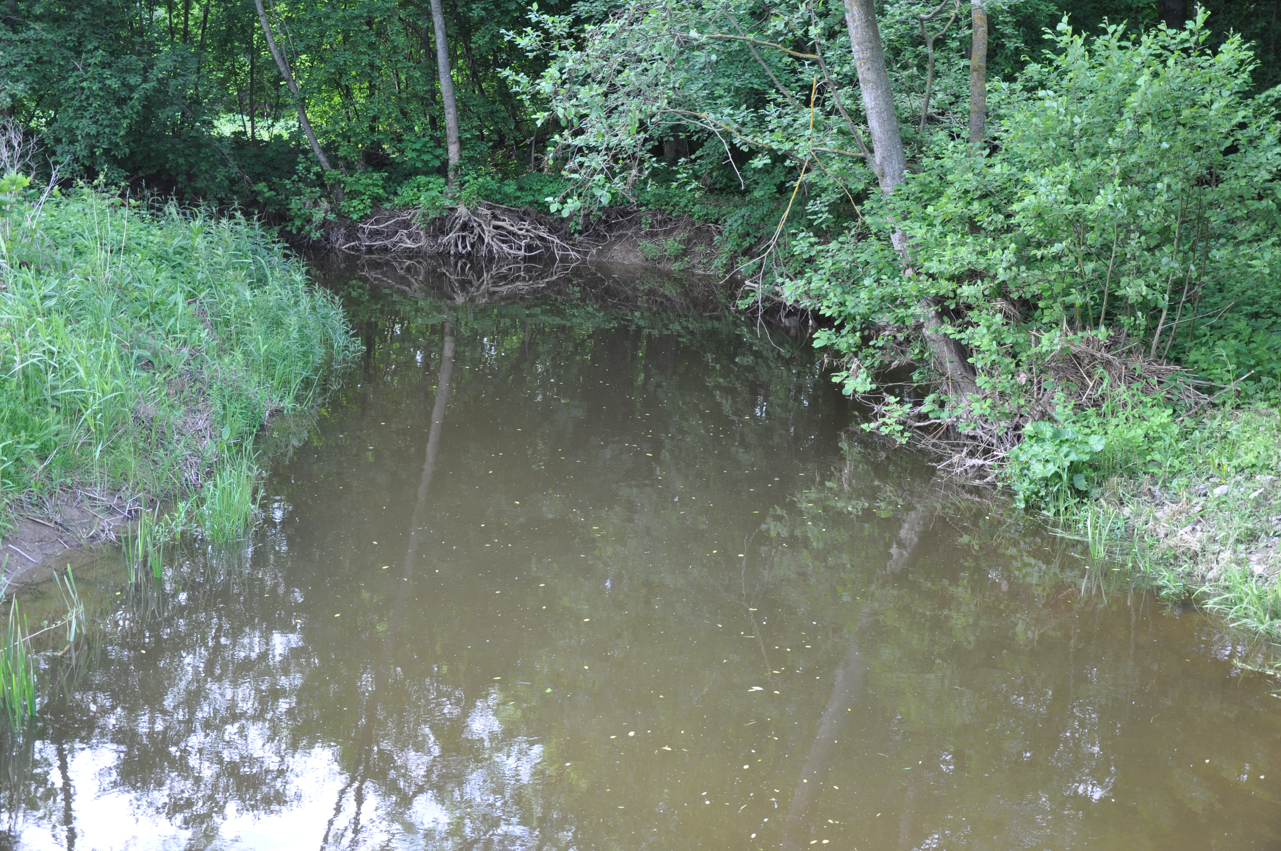 Bērstele, Rundāles pagasts, Rundāles novads, Latvia